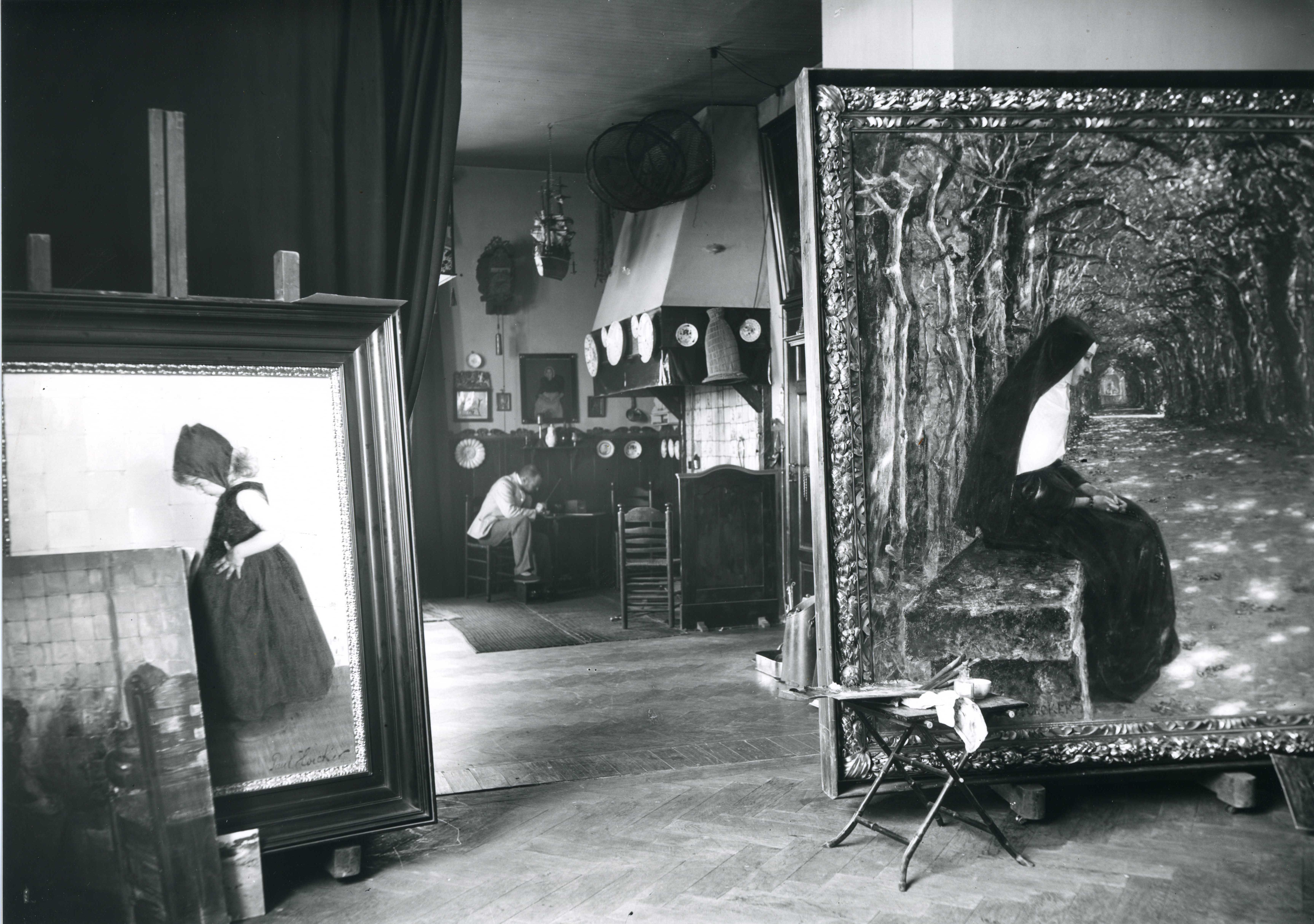 Paul Hoecker-Atelier in Oberlangenau